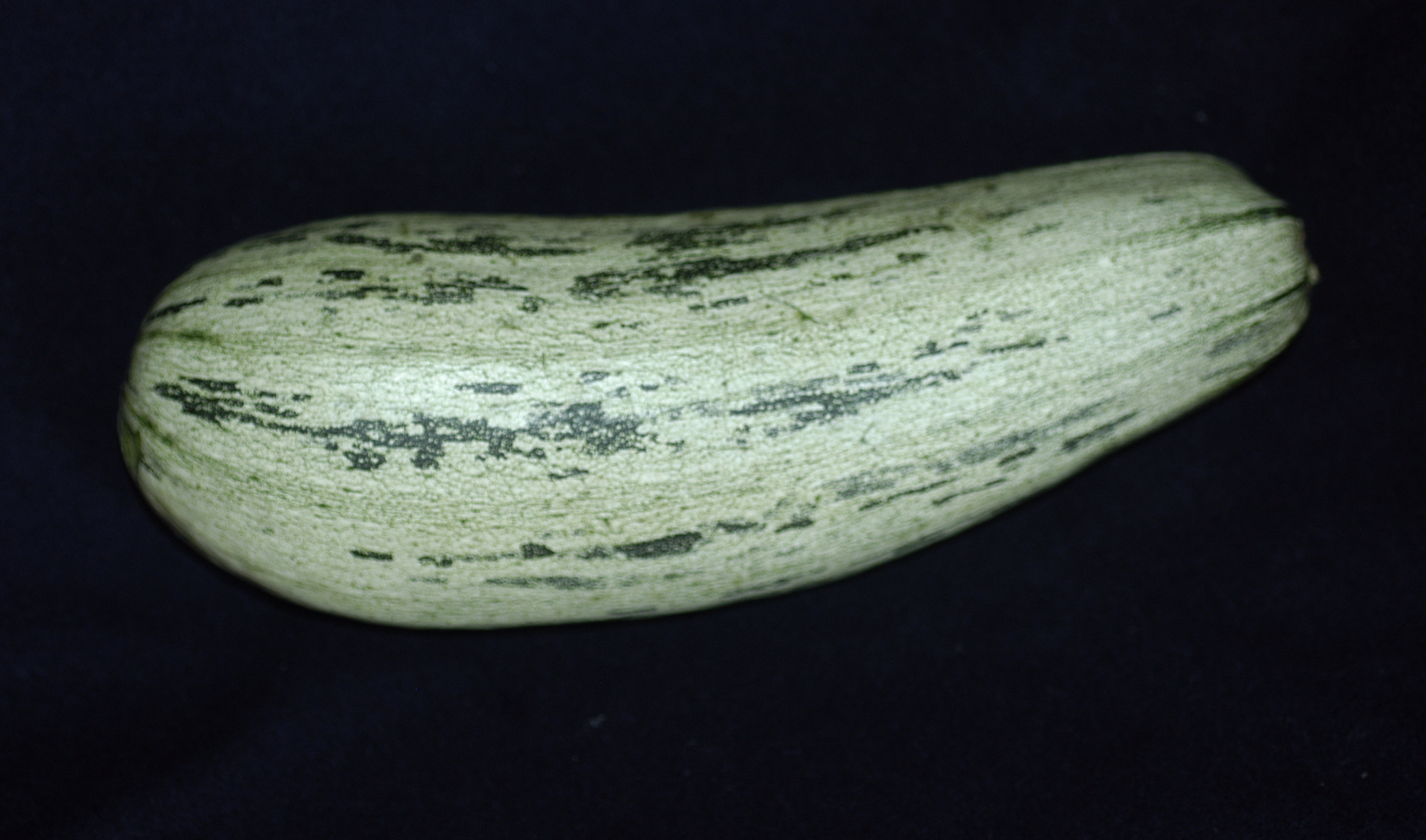 Abobrinha (Cucurbita pepo L.) var. hibrida Clarinda / Fruto